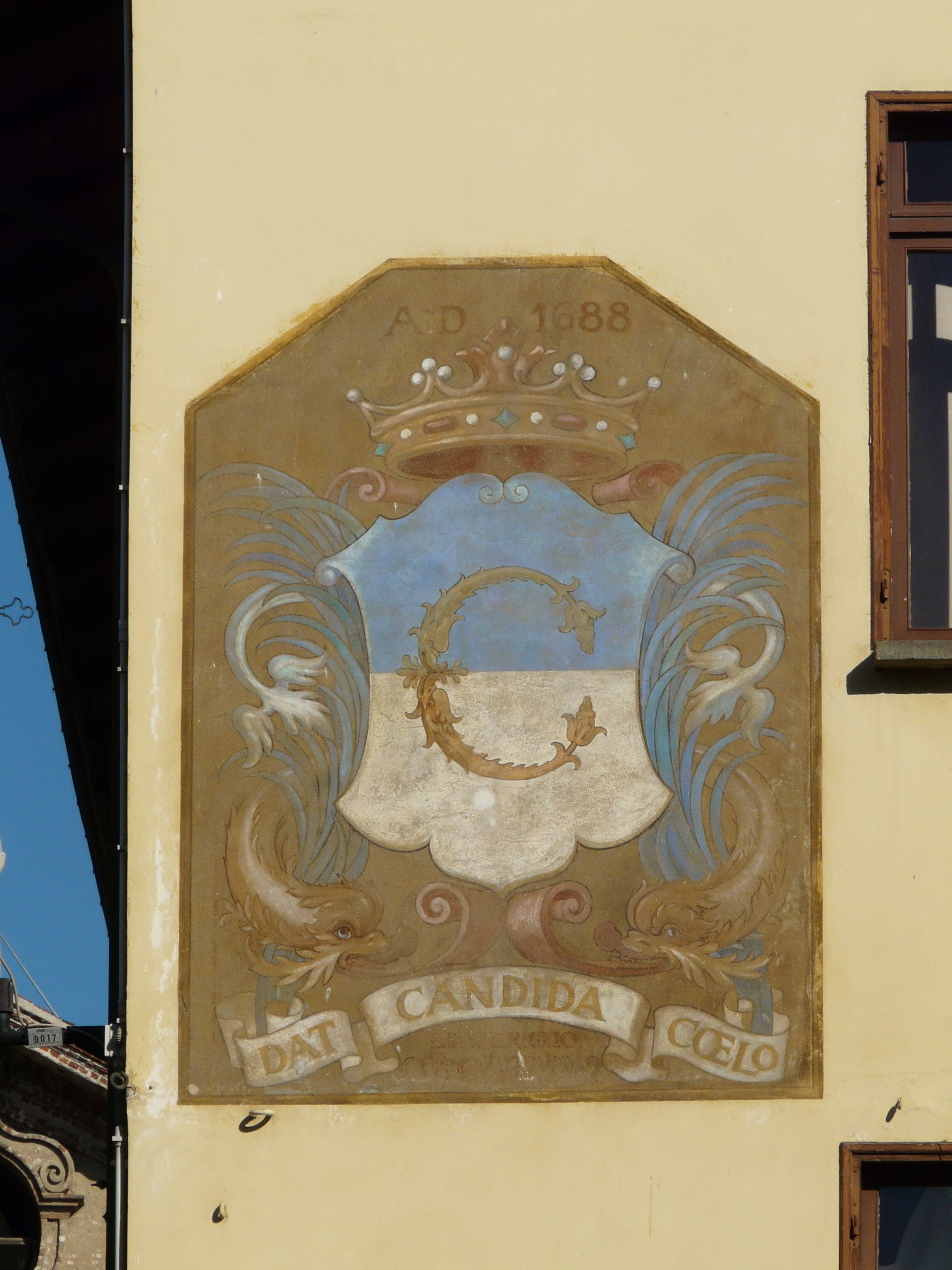 Stemma comunale presente su una facciata di un palazzo, Carmagnola, Piemonte, Italia